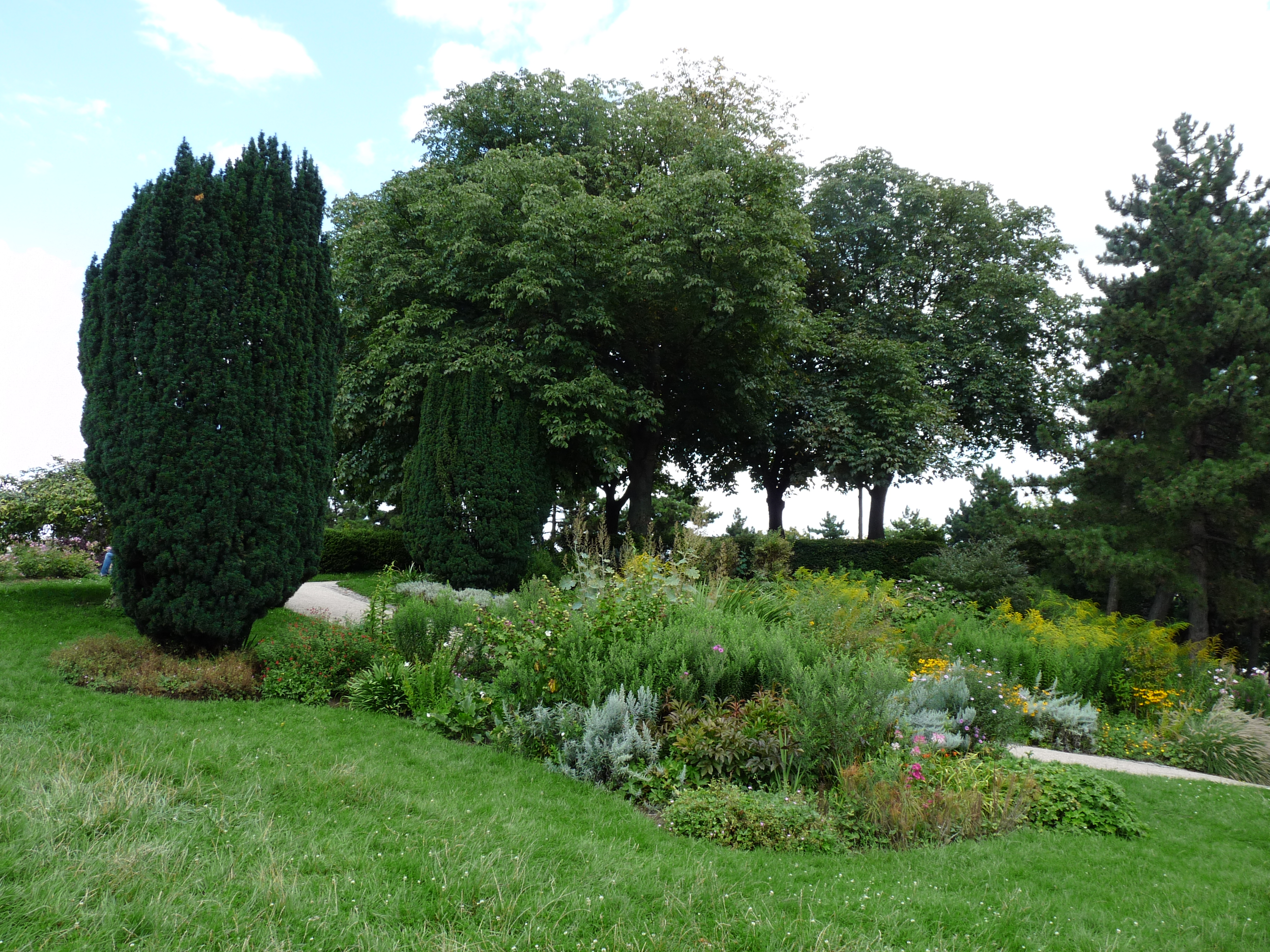 Le parc de la butte du Chapeau-Rouge a Paris